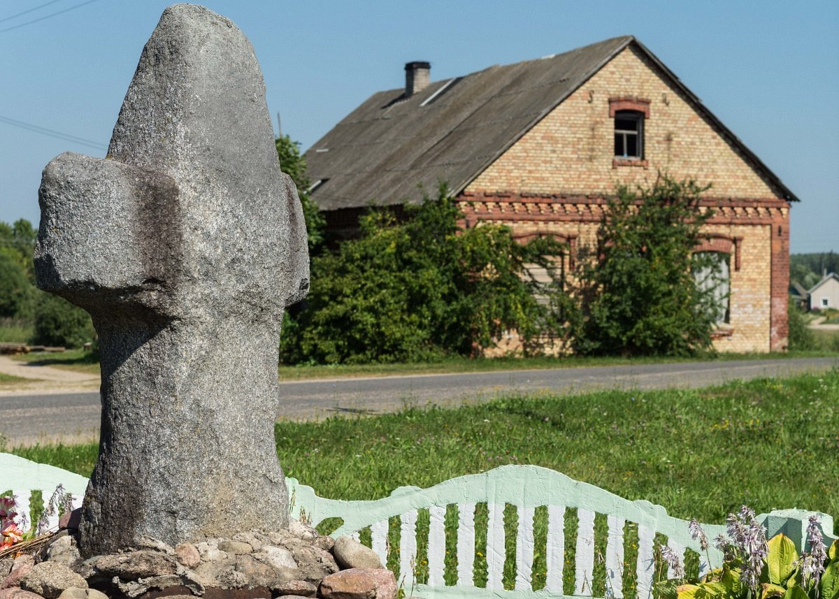 Пліса. Крыж